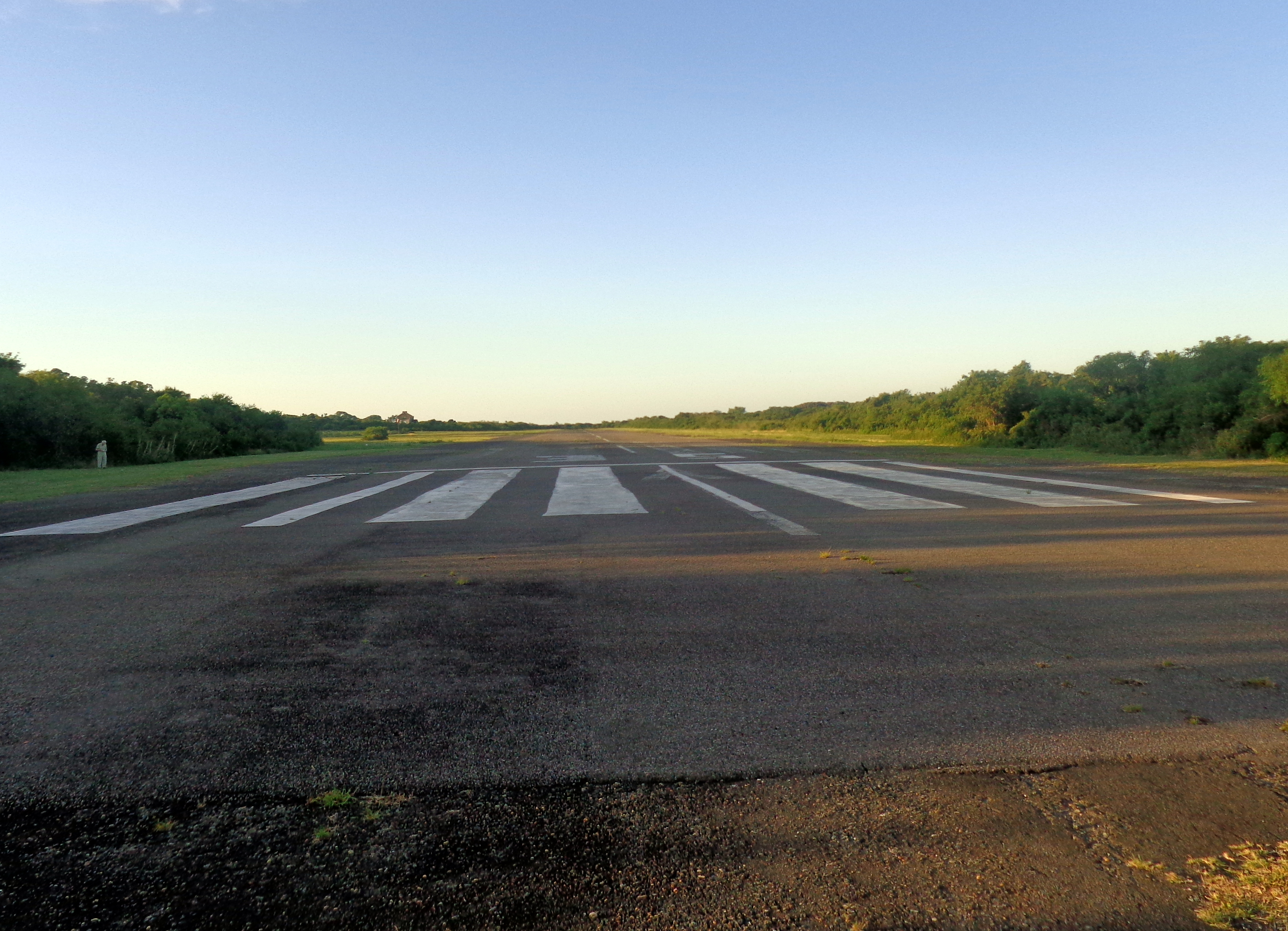 Aeropuerto Isla Martín García